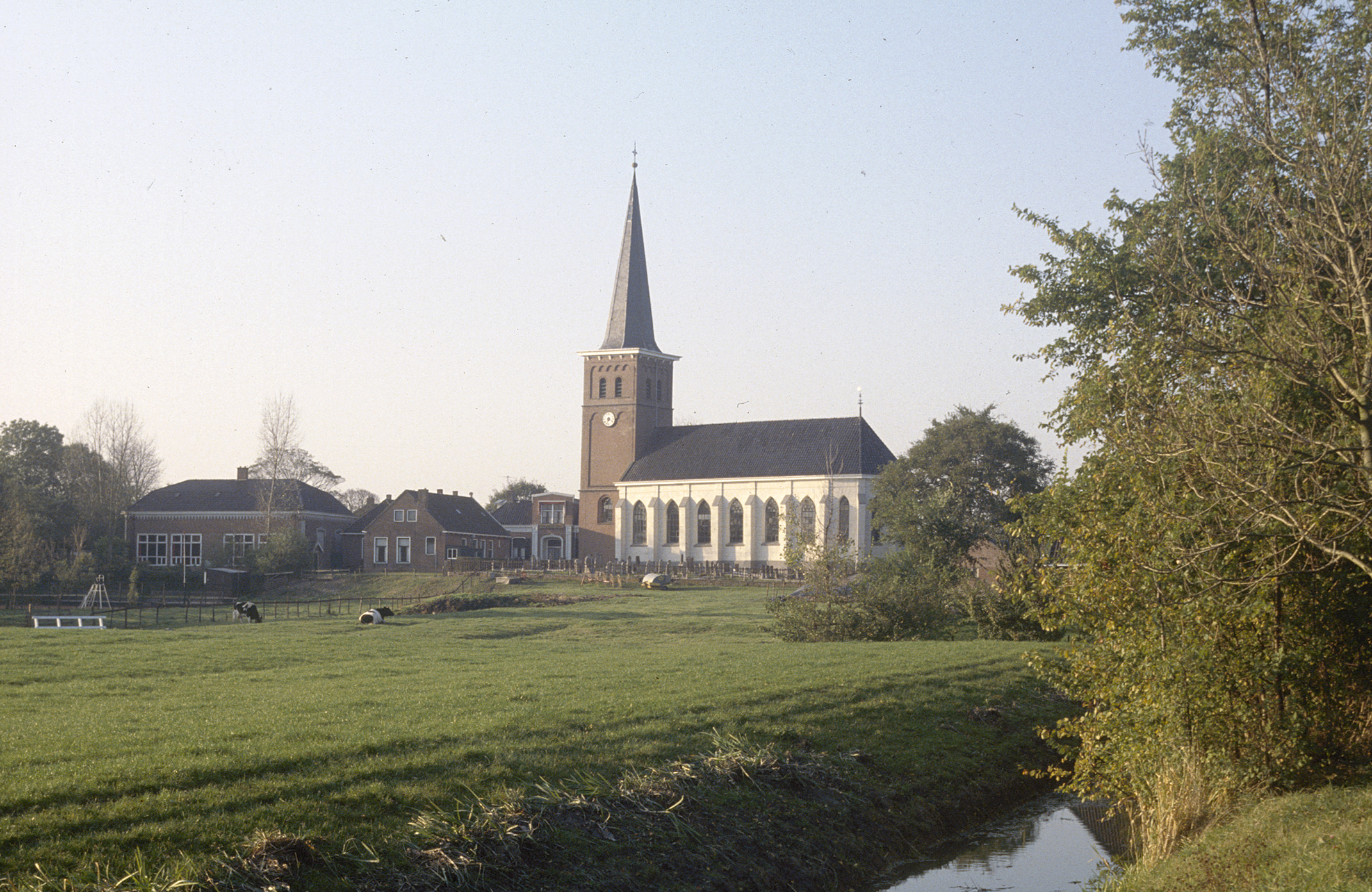 Nederlands Hervormde Kerk: overzicht (opmerking: Gefotografeerd voor: Kleur op historische gebouwen, W.F. Denslagen en A. de Vries)